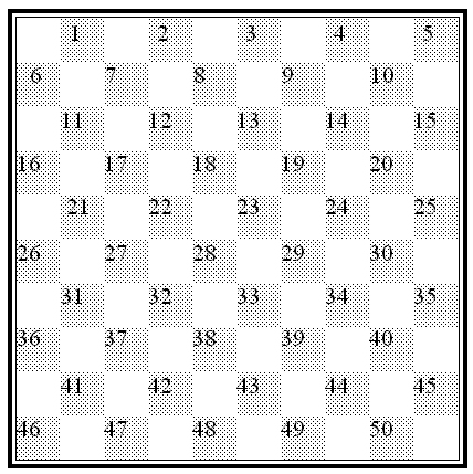 draugthboard numbering